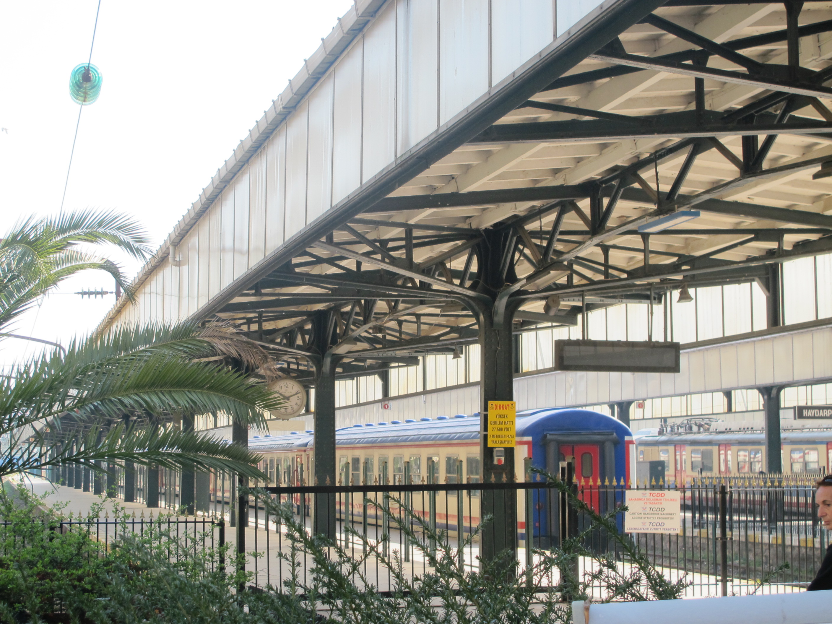 Bahnsteig am Istanbuler Bahnhof Haydarpaşa